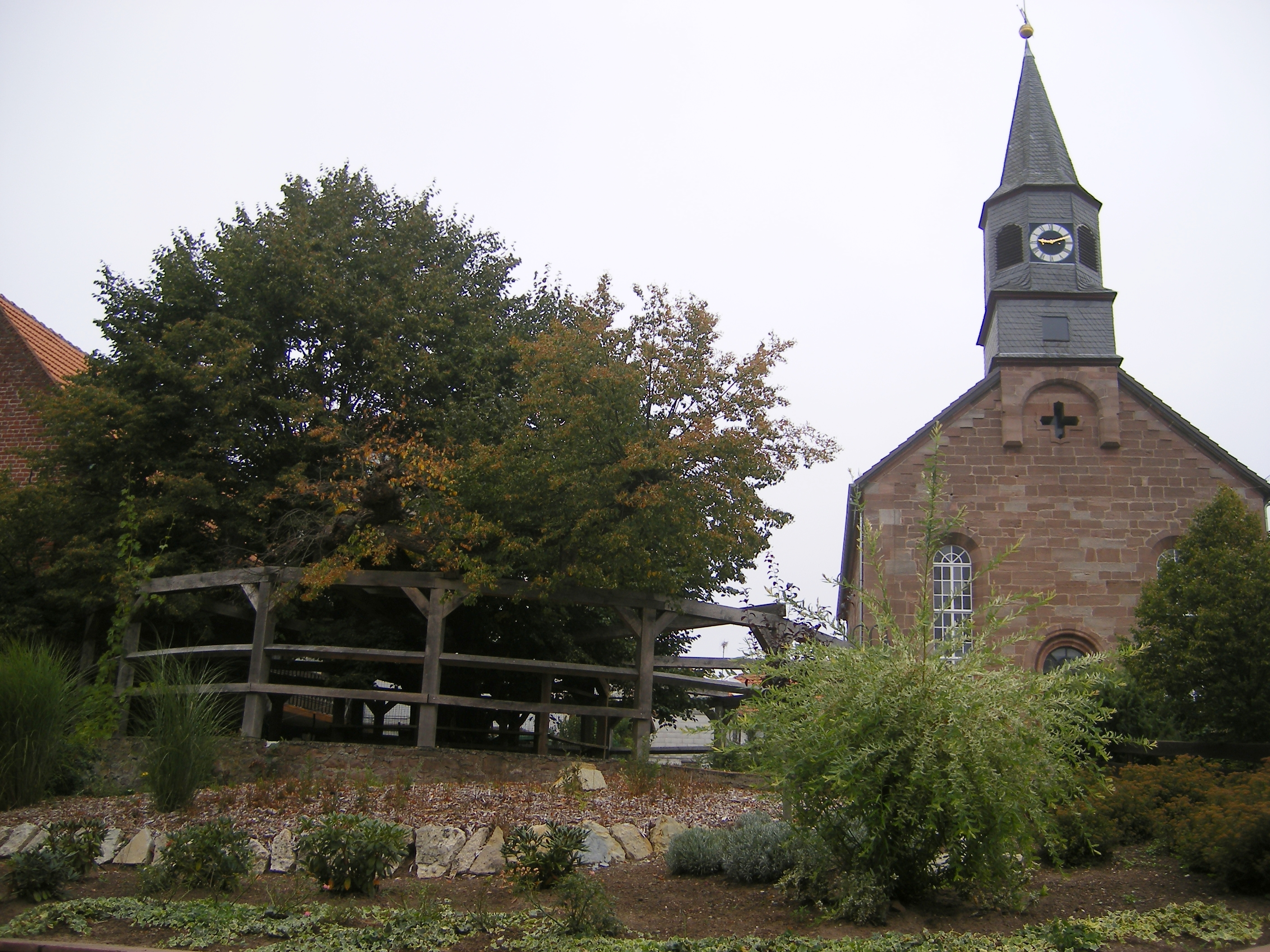 Die geleitete Linde in Gilserberg-Lischeid neben der evangelischen Dorfkirche von 1856